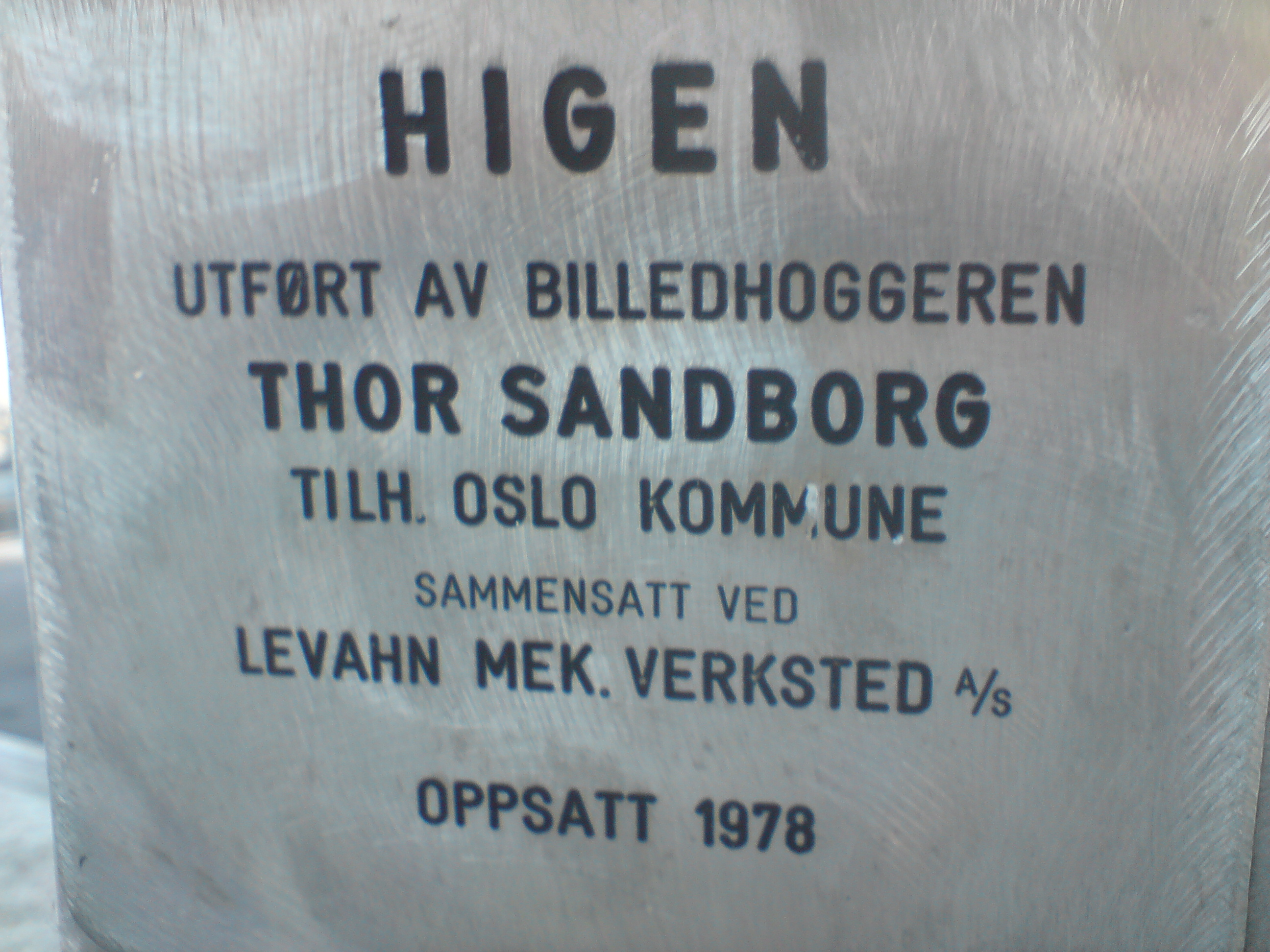 Marking at Statue at Helsfyr, Oslo